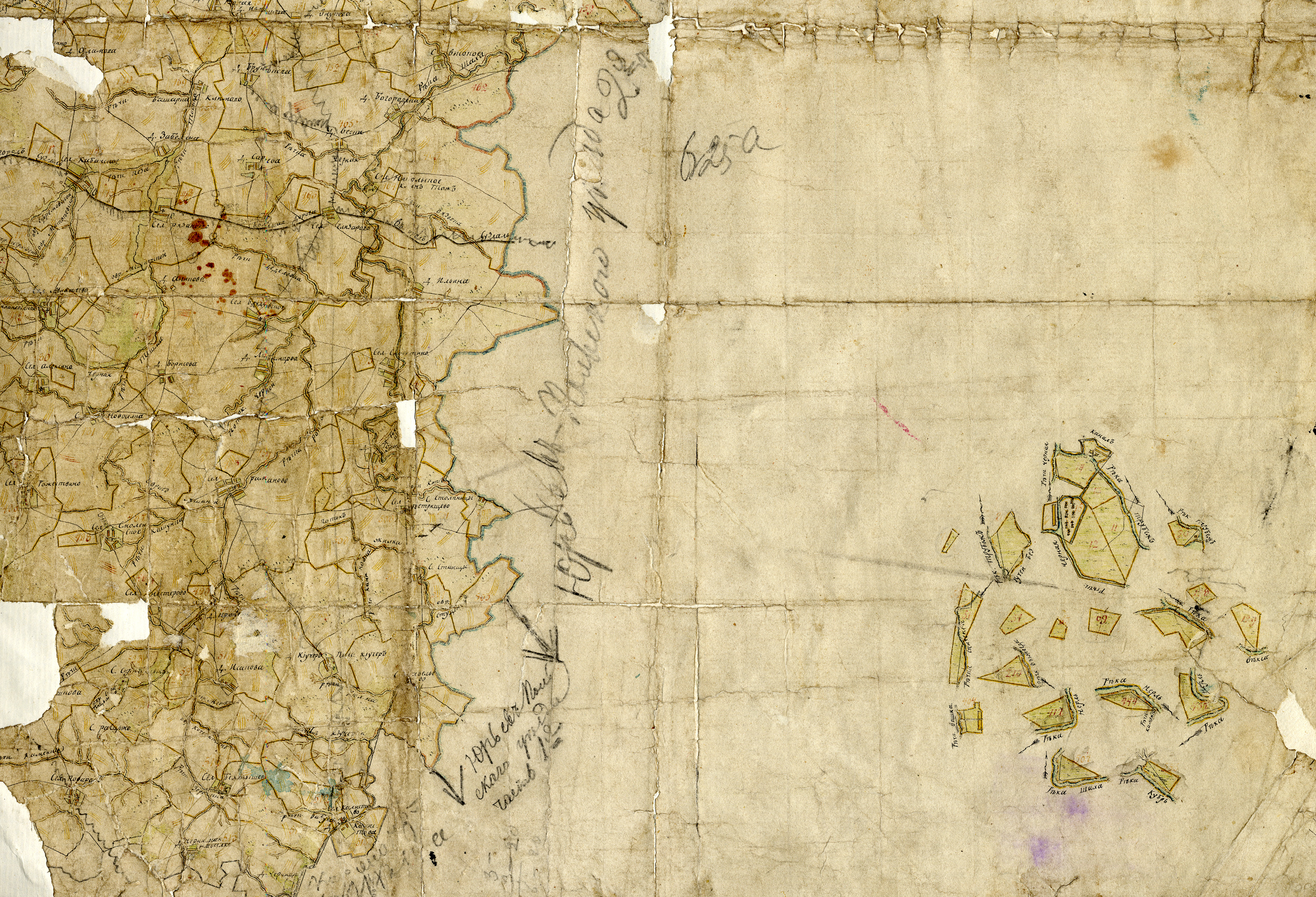 Карта Переславского уезда (ПГМ 2 версты) 1780 - 1790 гг